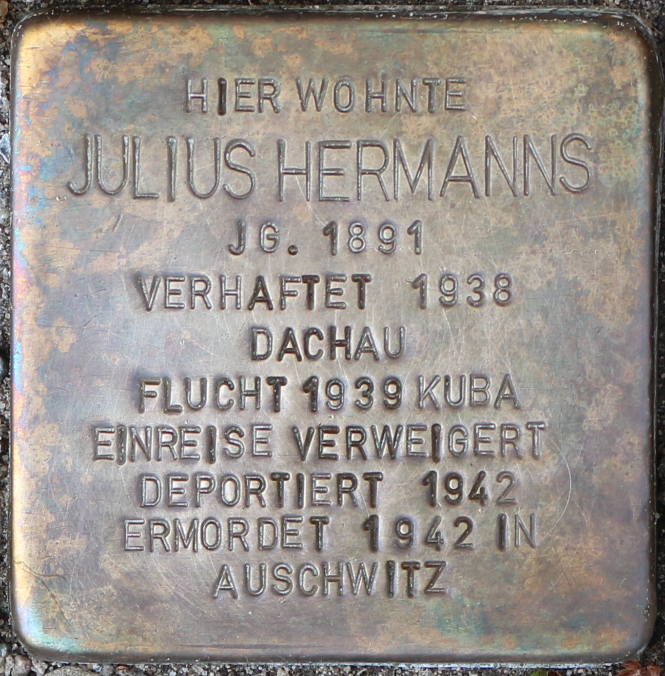 Stolperstein: Julius Hermanns (Blücherstraße 12), Mönchengladbach.